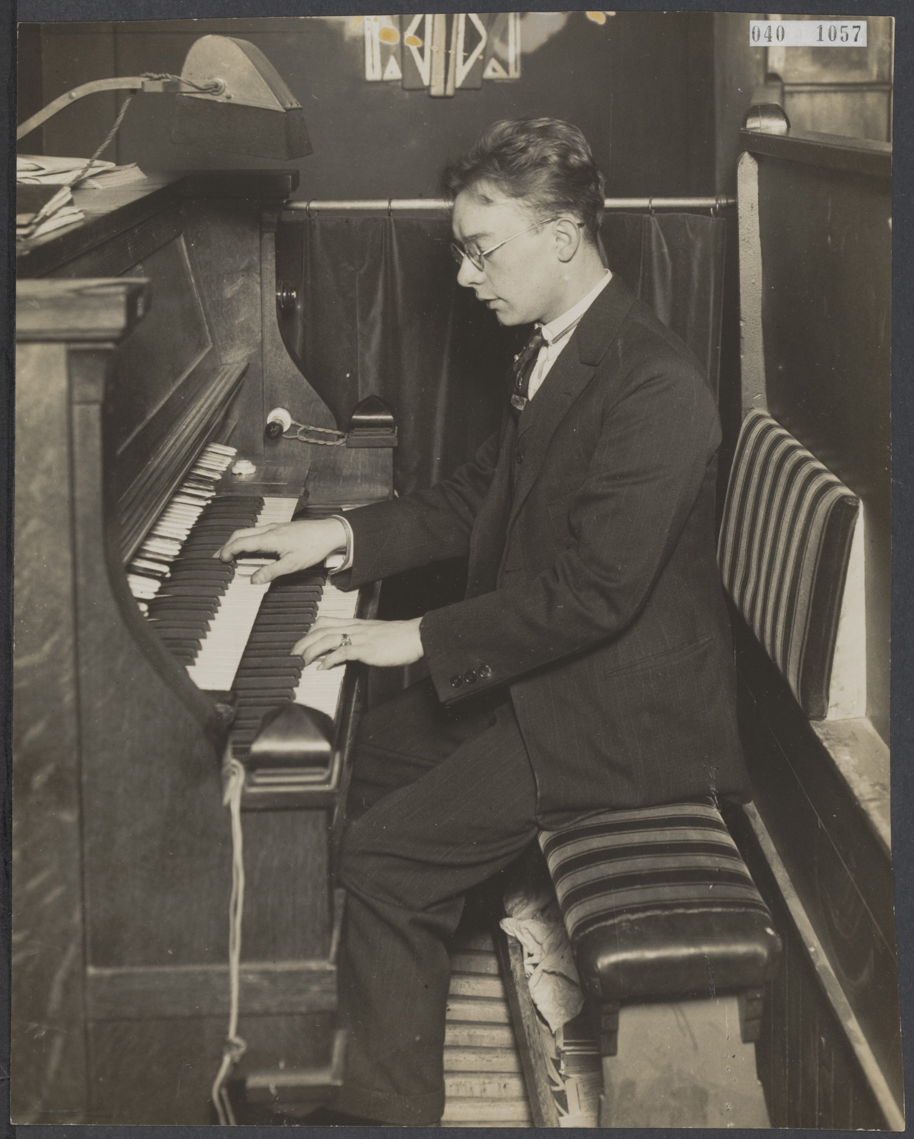 Organist Pierre Palla